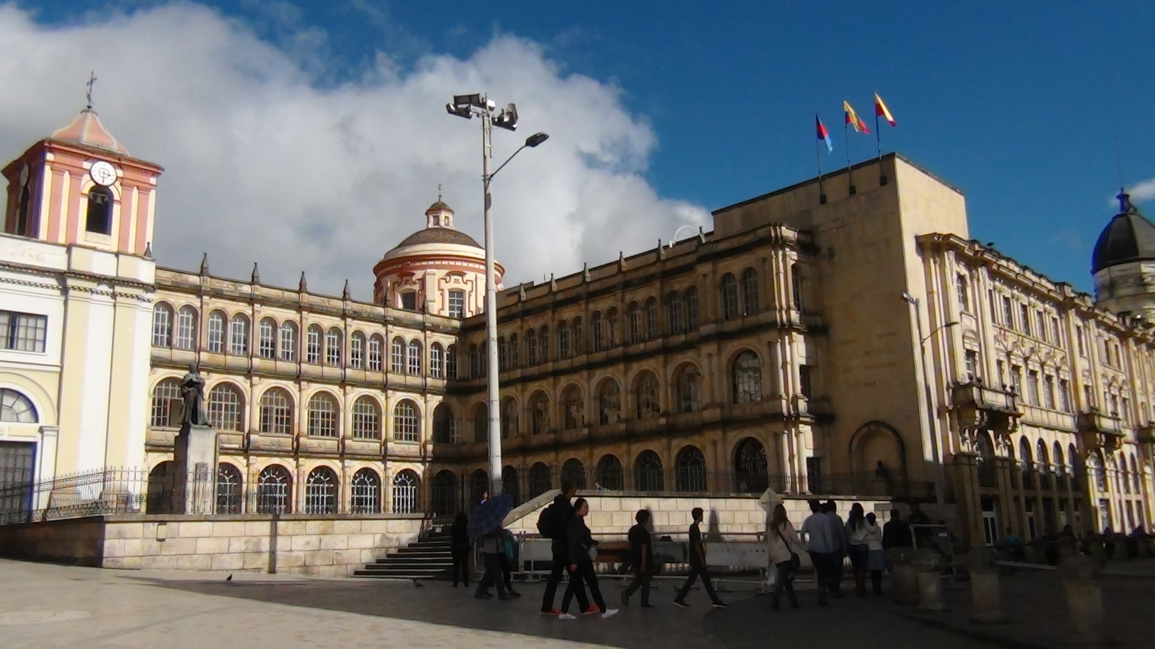 Colegio Mayor de San Bartolomé, Bogotá. Fundado el 27 de Septiembre de 1604 por la Compañía de Jesús.